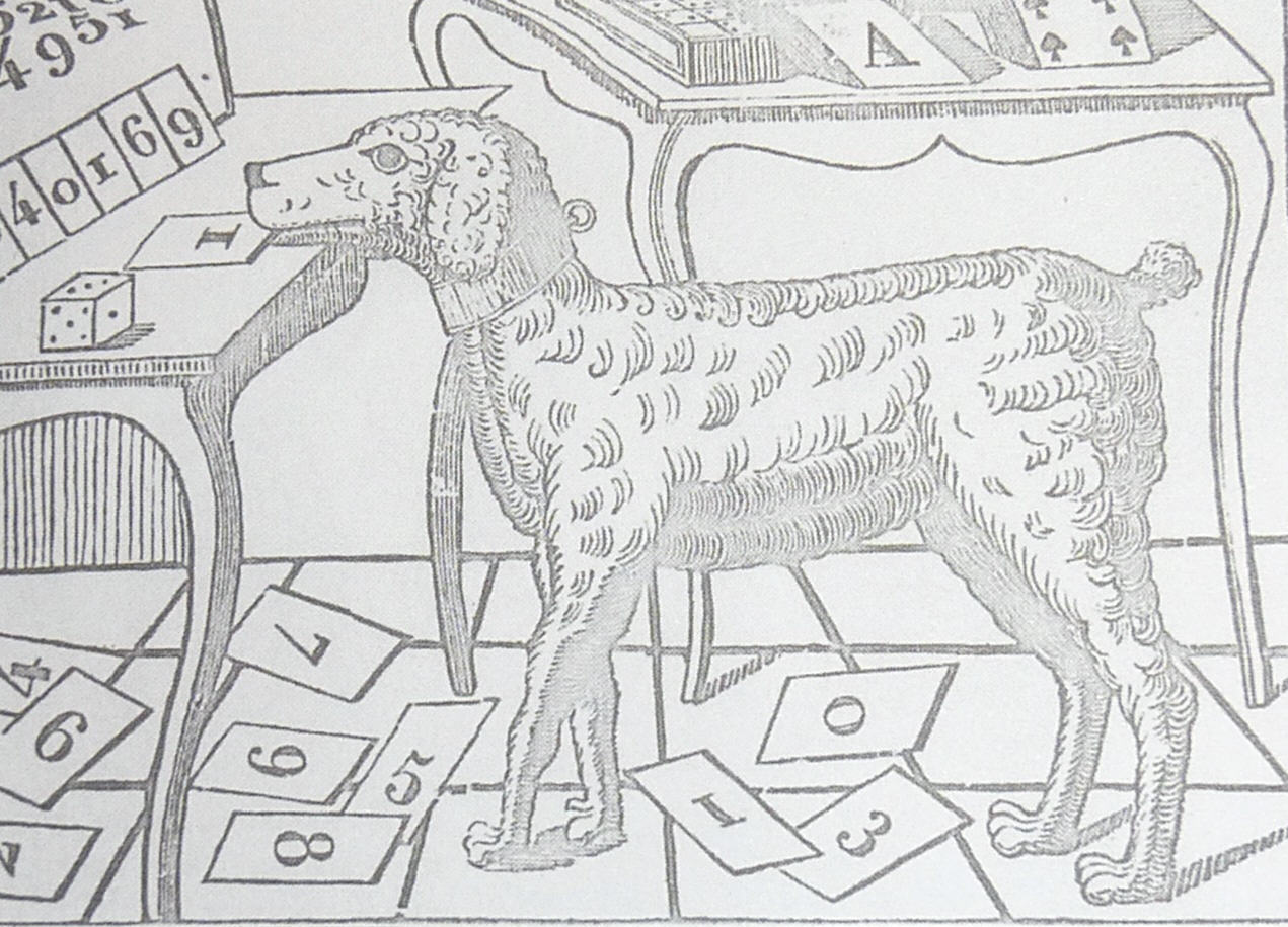 Munito I.